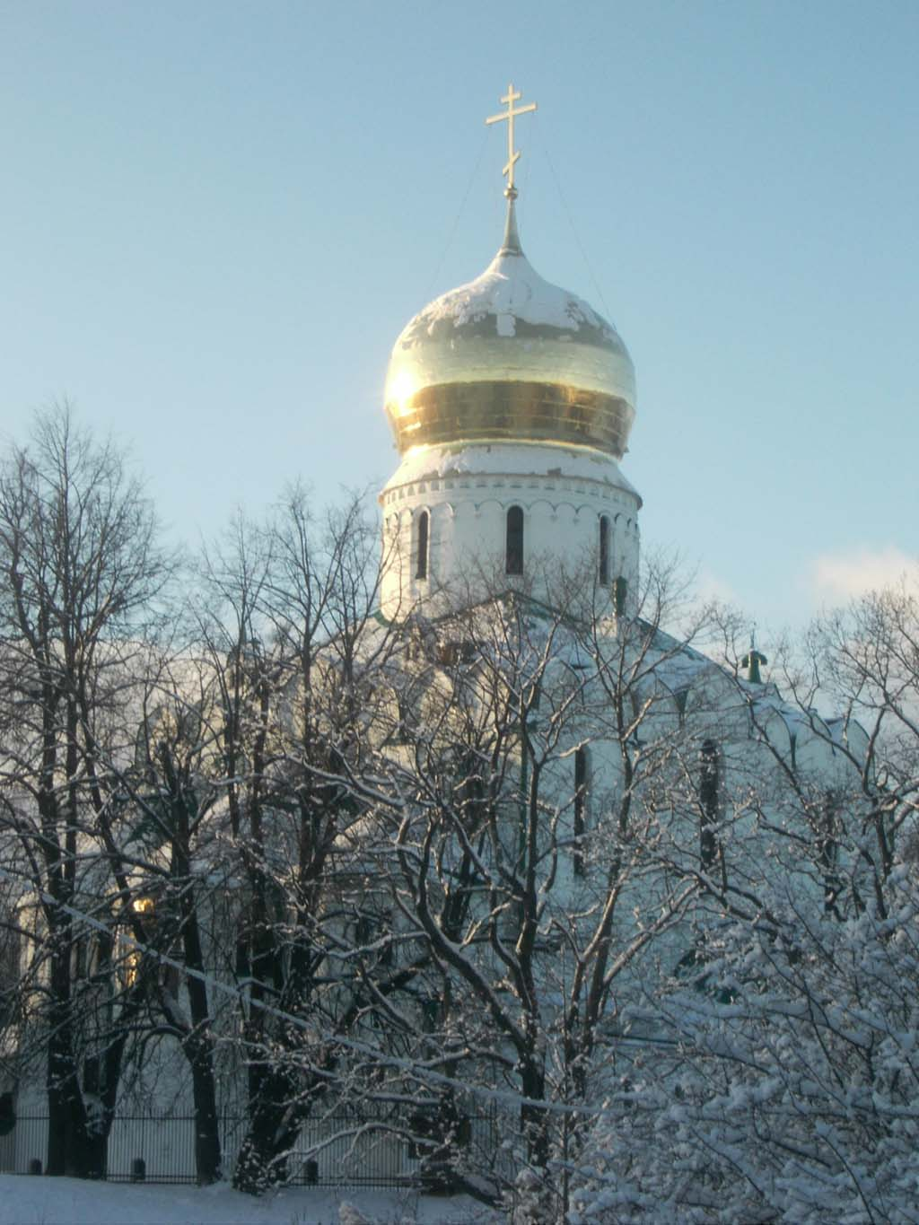 Фёдоровский собор зимой